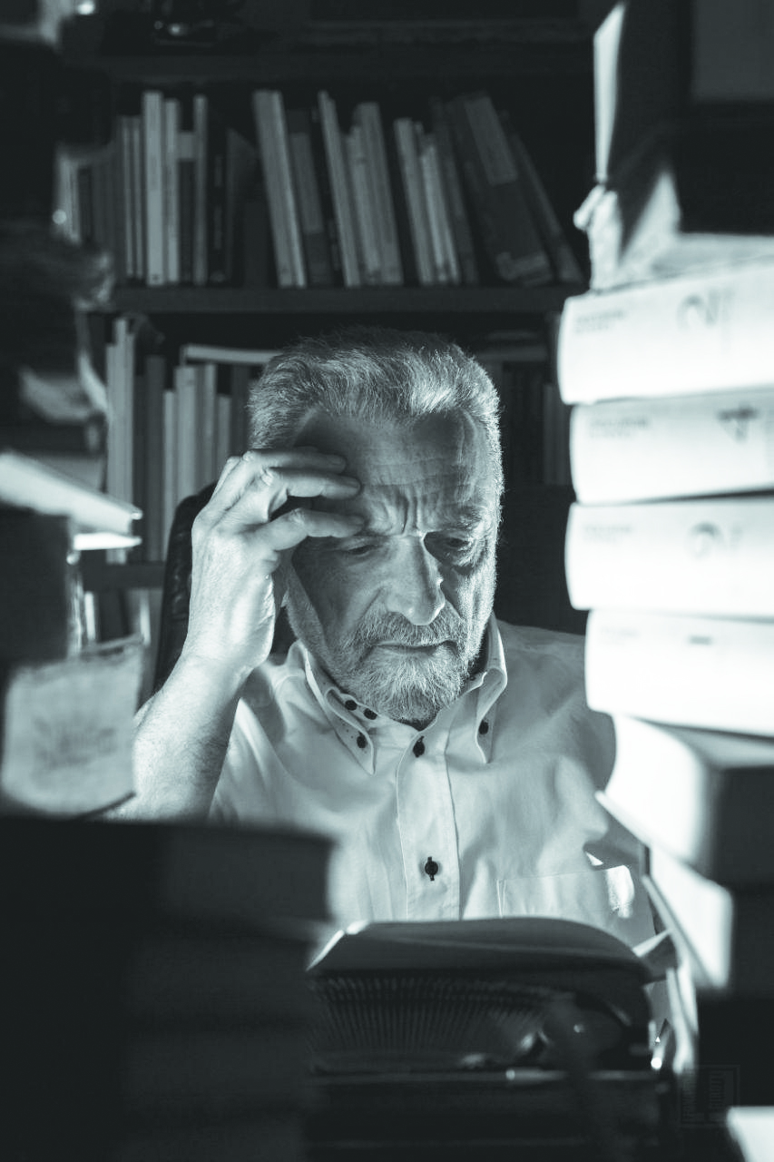 Il filosofo Armando Girotti nel suo studio al lavoro